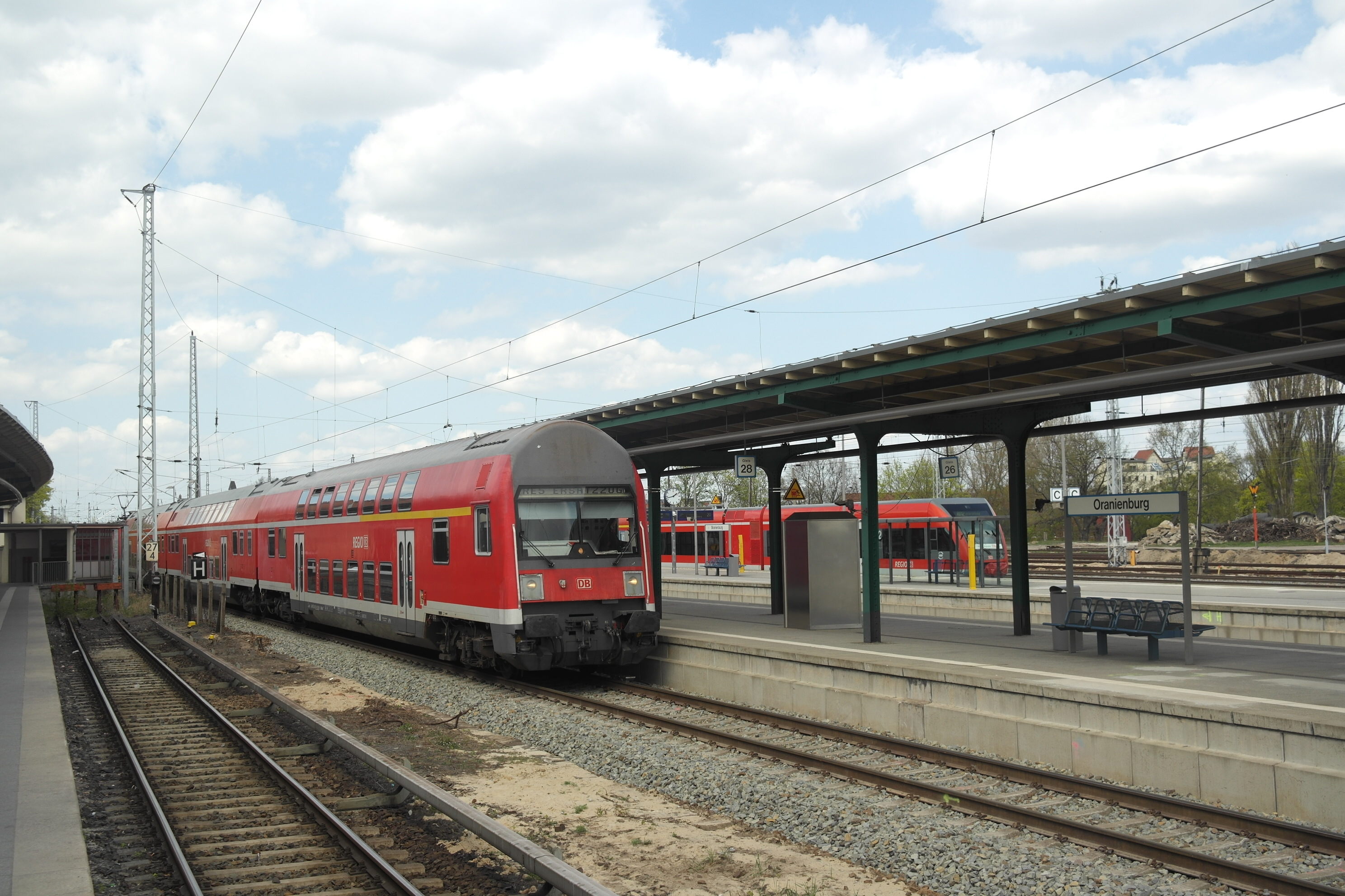 Bahnhof Oranienburg, Bahnsteige